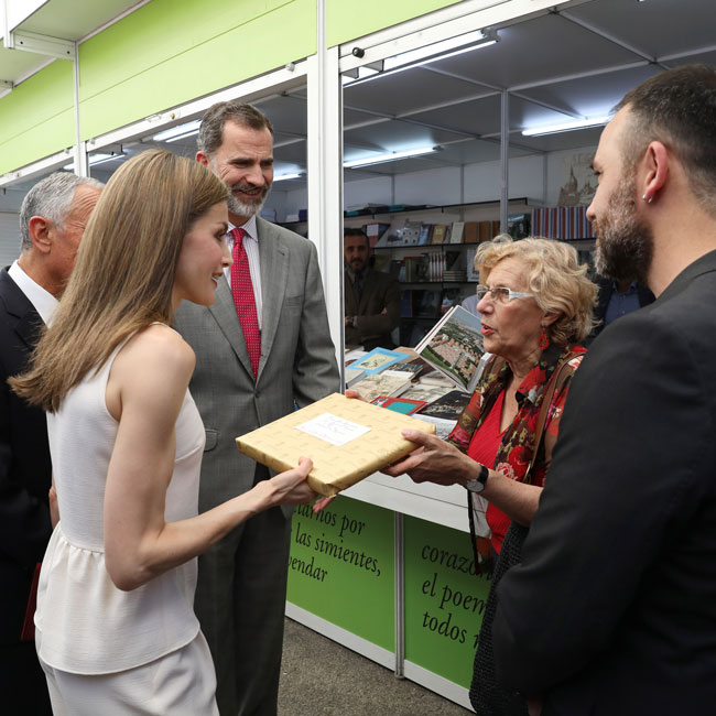 Madrid cumple hoy con una de sus tradiciones anuales más consolidadas y apreciadas por los ciudadanos: la Feria del Libro. Desde 1933, esta cita con el mundo editorial se convierte para muchos en visita obligada a finales de la primavera. Este año tiene como protagonista la cultura lusa, ya que Portugal es el país invitado. La alcaldesa de Madrid, Manuela Carmena, junto al concejal del distrito de retito, Nacho Murgui, ha acompañado a mediodía de hoy a SS.MM los Reyes y al presidente de la República de Portugal, Marcelo Rebelo de Sousa, a la inauguración de esta 76ª edición de la feria madrileña. Y, estando entre libros, Carmena ha obsequiado con libros a los Reyes y al presidente portugués. A don Felipe y doña Letizia les ha regalado el catálogo de la exposición Carlos III y el Madrid de las Luces, editado con motivo de esta muestra celebrada en el Museo de Historia de Madrid para conmemorar el tercer centenario del nacimiento del monarca. A Rebelo de Sousa, le ha entregado El cartapacio del cortesano errante, un libro con el que se conmemora la vuelta de la Corte Española a Madrid en 1606, tras cinco años de ausencia por su traslado a Valladolid ante el mandato de Felipe III. Este documento histórico ha sido editado por los talleres municipales de la Imprenta Artesanal.